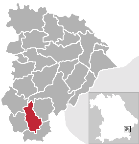 Lage von Kirchweidach im Landkreis Altötting